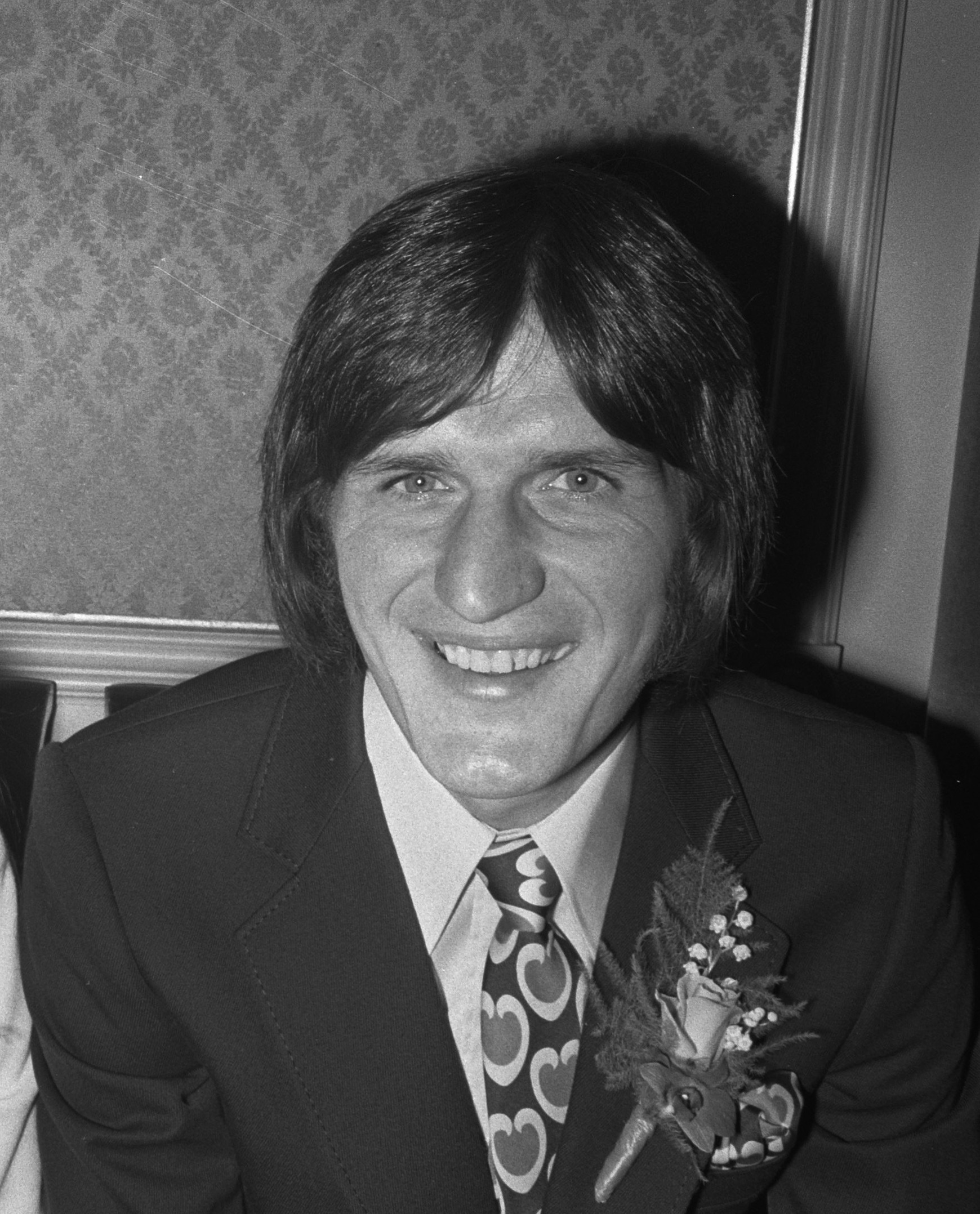 Voetballer Lex Schoenmaker trouwt met Corrie van Gerven op stadhuis Den Haag